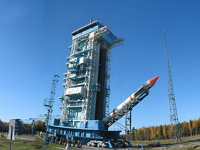 Fotografia lanzadera espacial Kosmos-3M